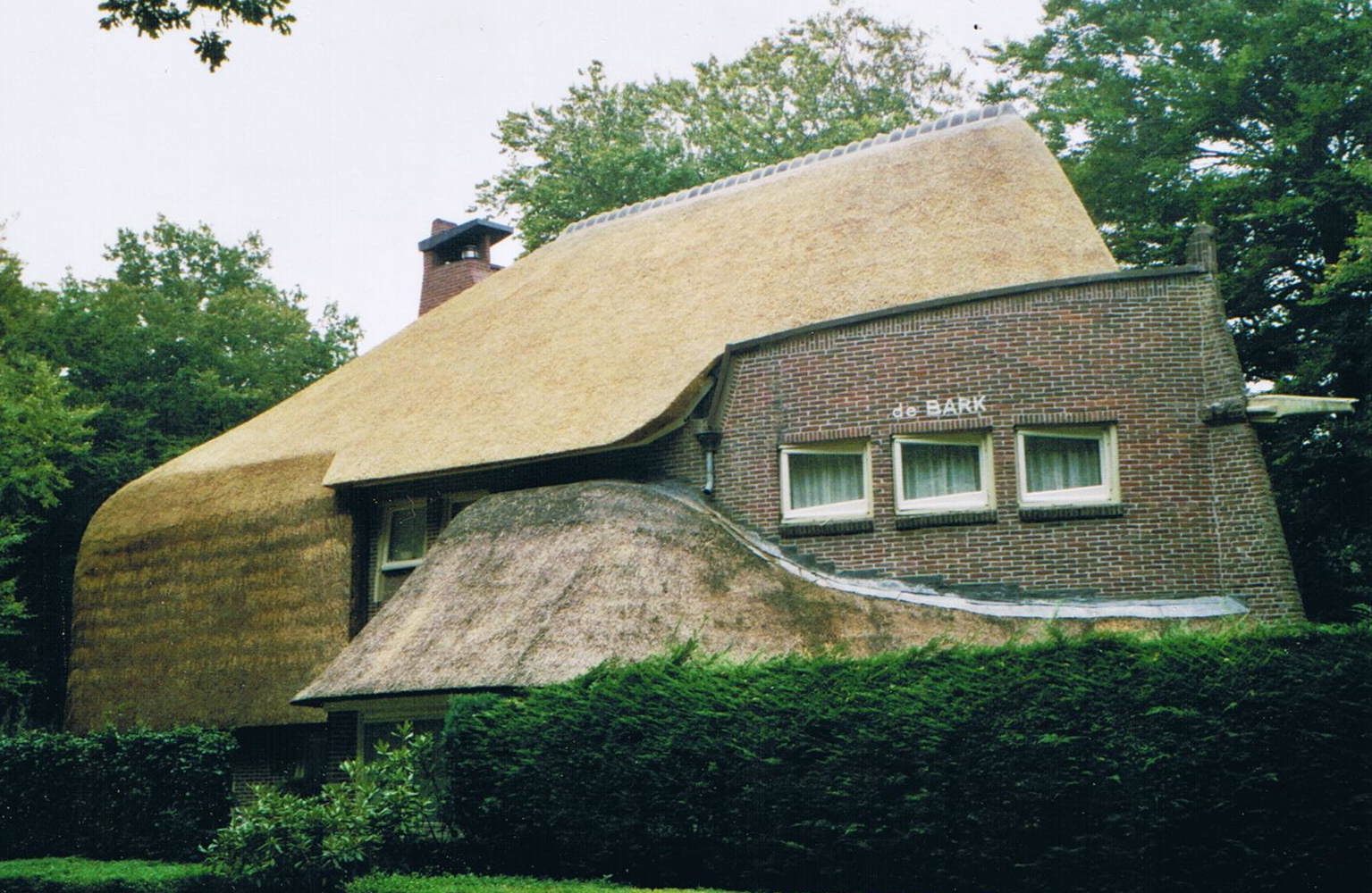 Bergen (NH), Park Meerwijk, landhuis De Bark (J.F.Staal, 1918)